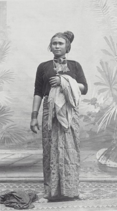 Foto. Studioportret van een voorname vrouw uit de Pedir-streek, Atjeh